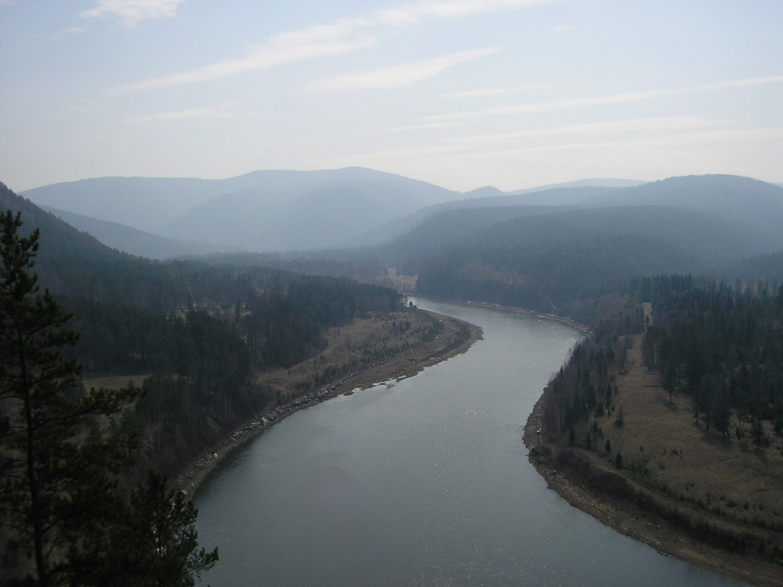 Река Мана. Вид с горы. Красноярский край.